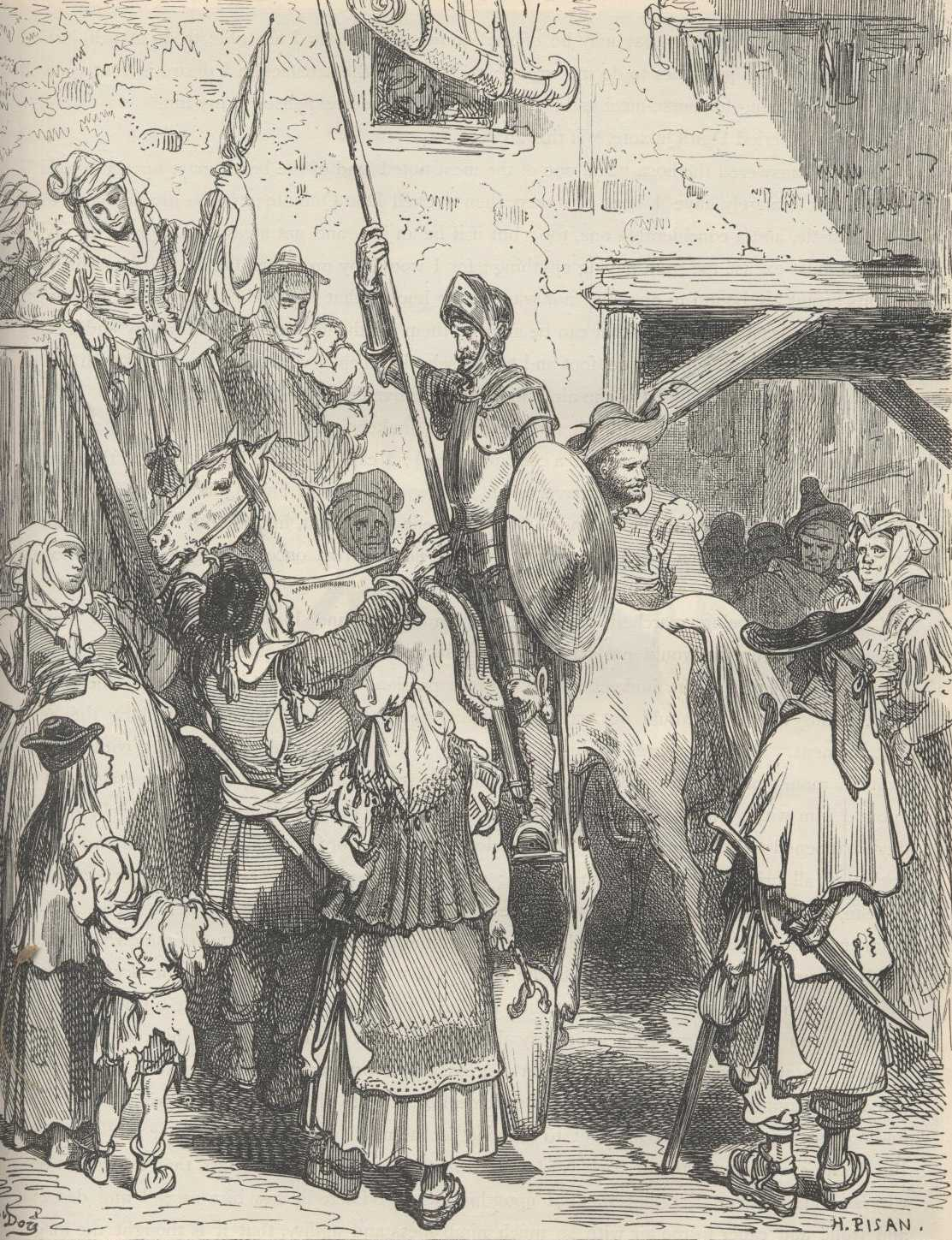 Dom Quixote abandona a estalagem